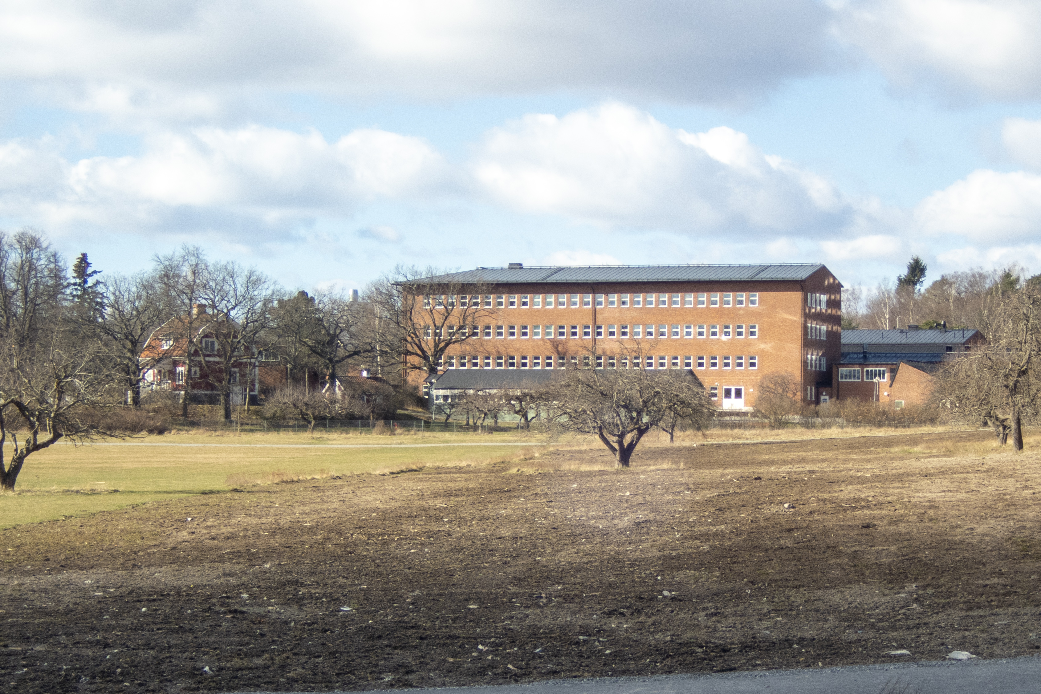 Frescati Backe, Stockholms Universitet. Husen byggdes under åren 1940-1944 för Kungliga Veterinärhögskolan och Statens Veterinärmedicinska anstalt (SVA), efter ritningar av arkitekterna Gunnar Asplund (1885-1940) och Joel Lundeqvist (1894-1947), som fullföljde Asplunds idéer efter dennes död..